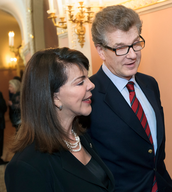 Фестиваль и премия «Золотая маска» 2012 года